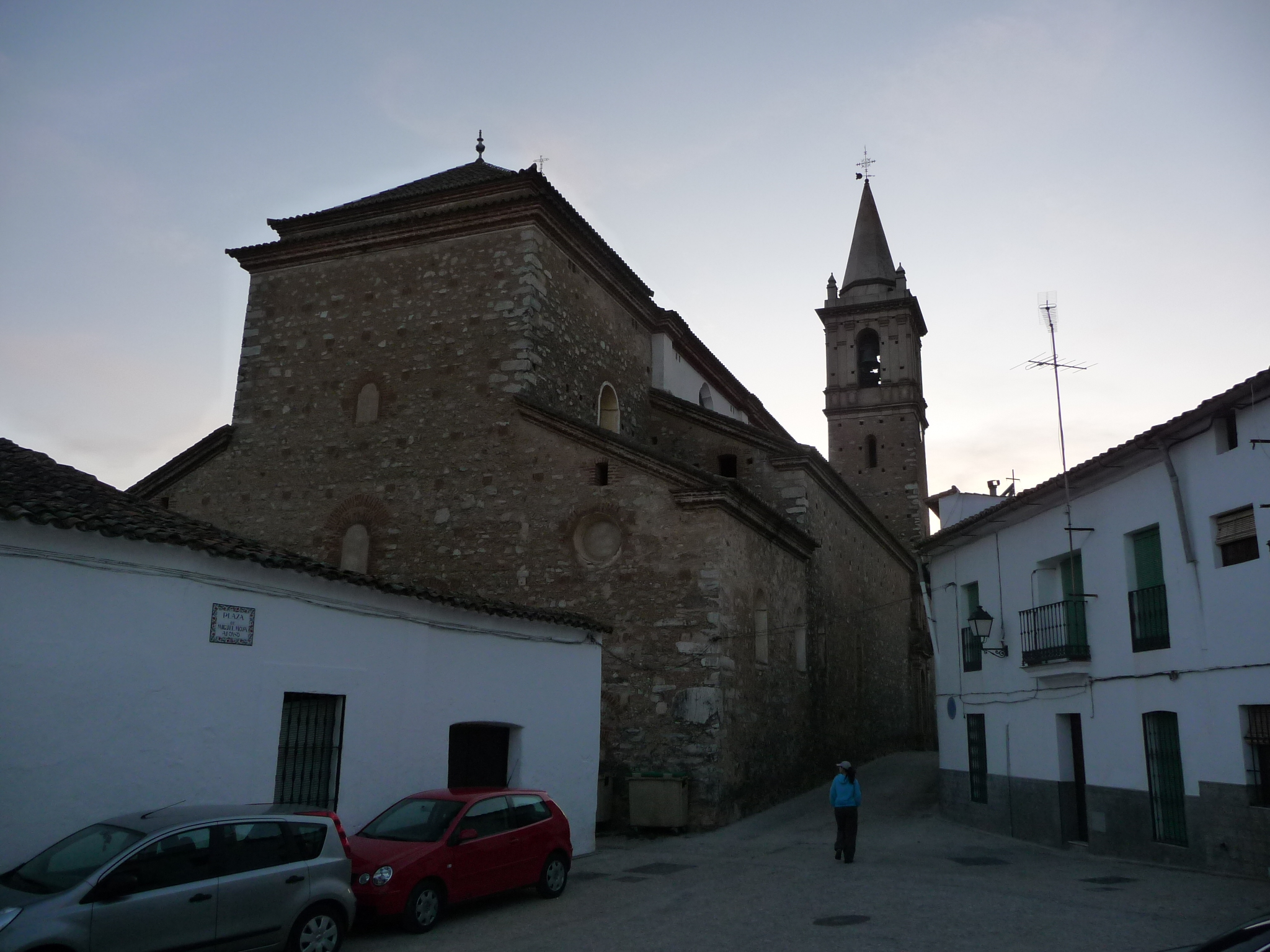 Alajar-P1040685.JPG